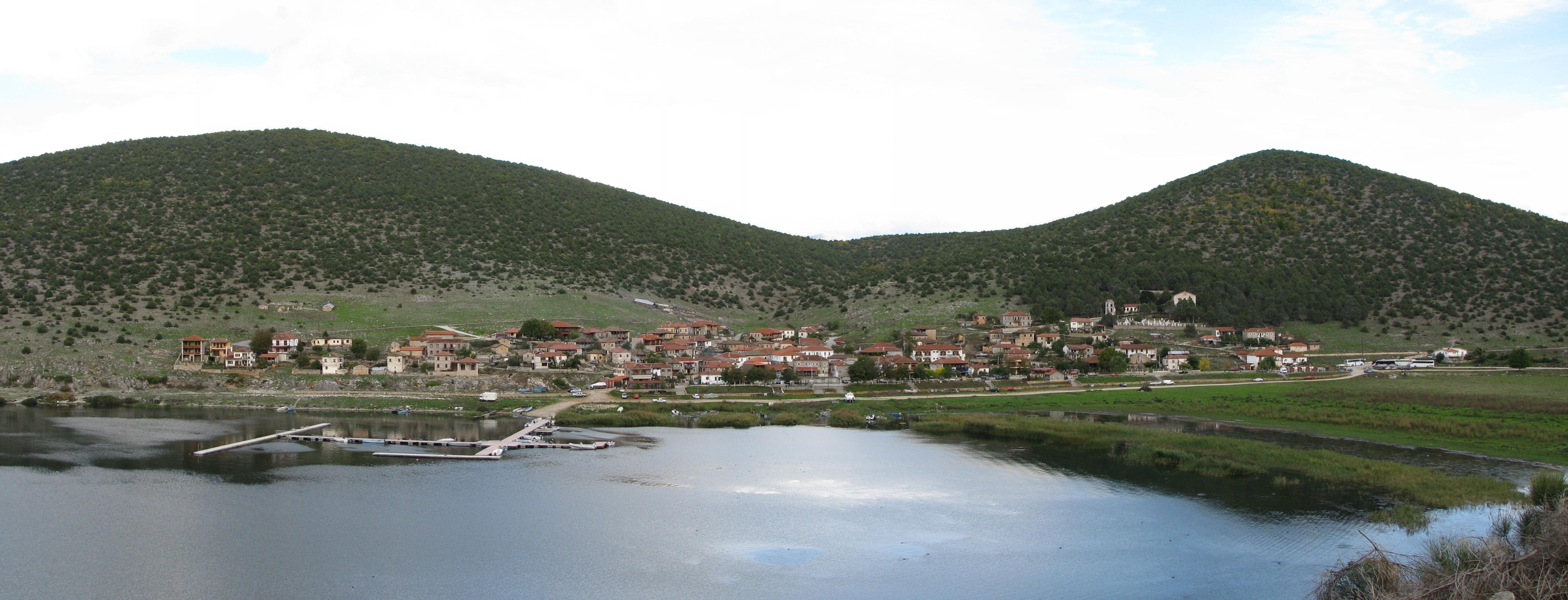 Село Нивици (Псарадес), дем Преспа, Егейска Македония, Гърция.